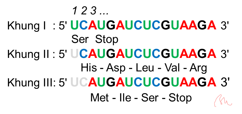 Mô tả phân biệt "khung đọc mã" với "khung đọc mở"